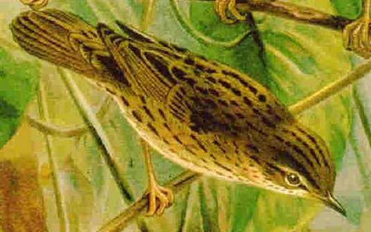 Stripesanger (Locustella lanceolata)